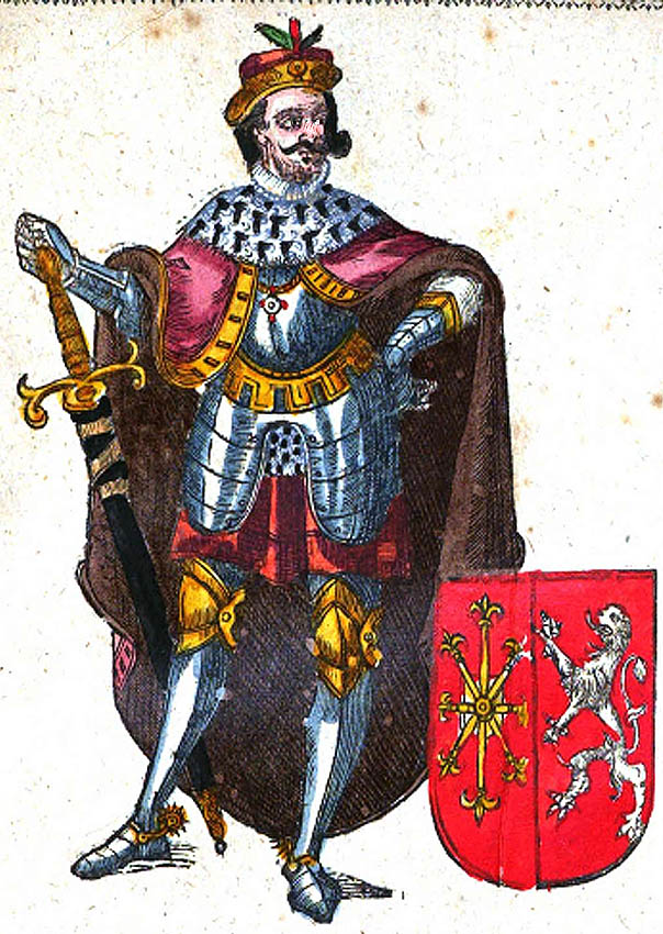 De afbeelding komt uit het boek Stam-Buch der hochgebornen und beruhmten Grafen und durchleuchtigen Hertzogen. (in 1677 gedrukt in Arnhem) De afbeelding stamt dus ook uit die tijd. De tekenaar is mij helaas onbekend.